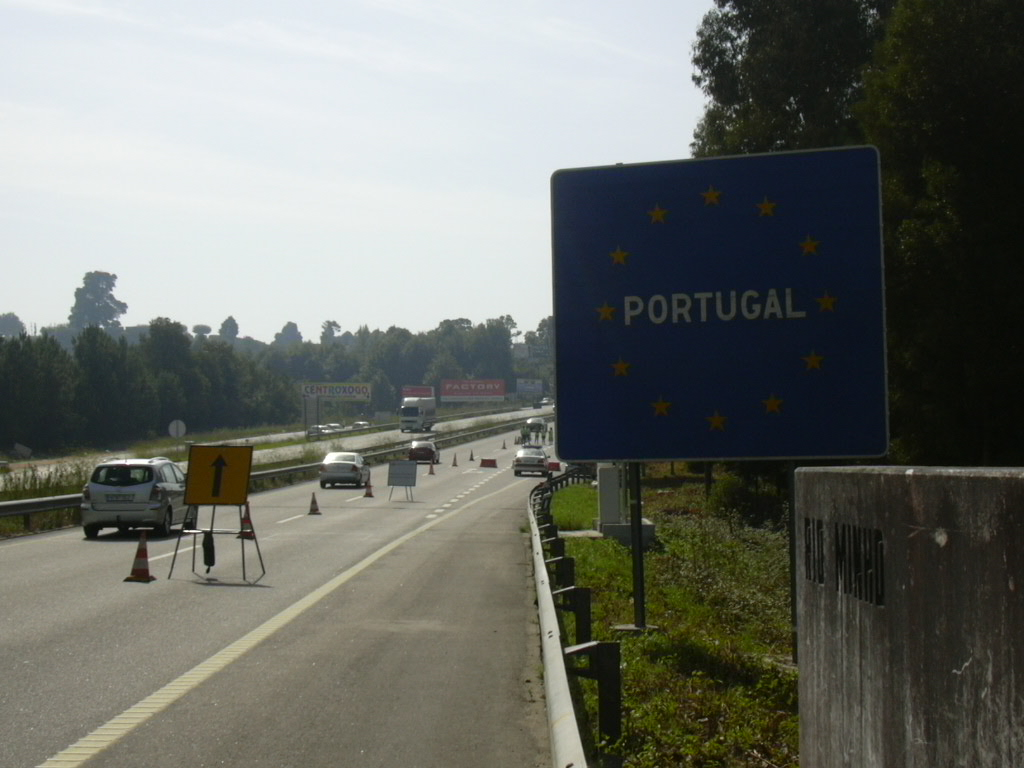 Fronteira entre Espanha e Portugal (Tui e Valença do Minho)